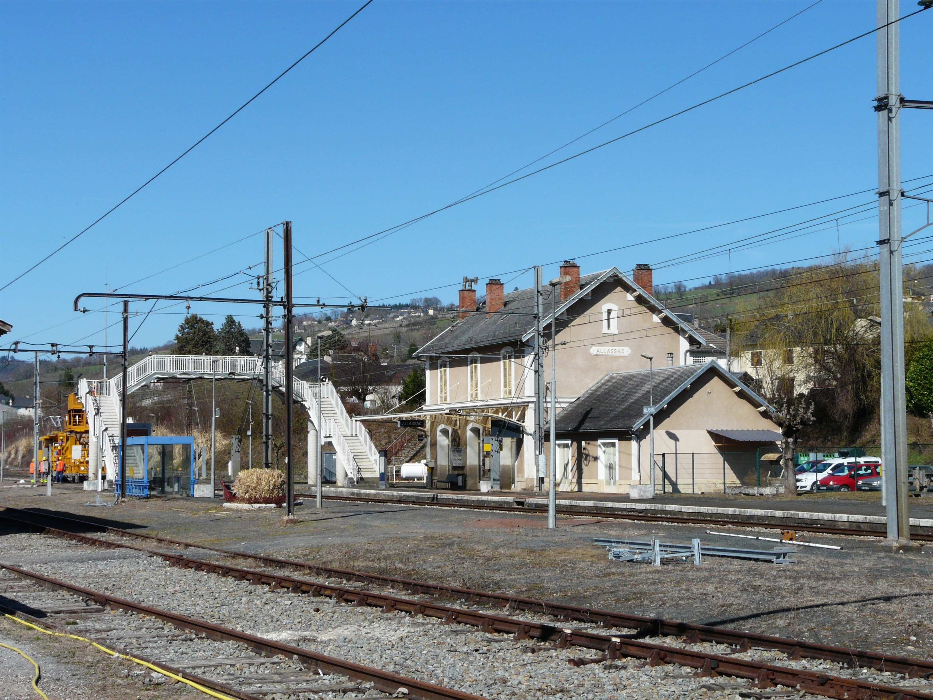 La gare d'Allassac, Corrèze, France.